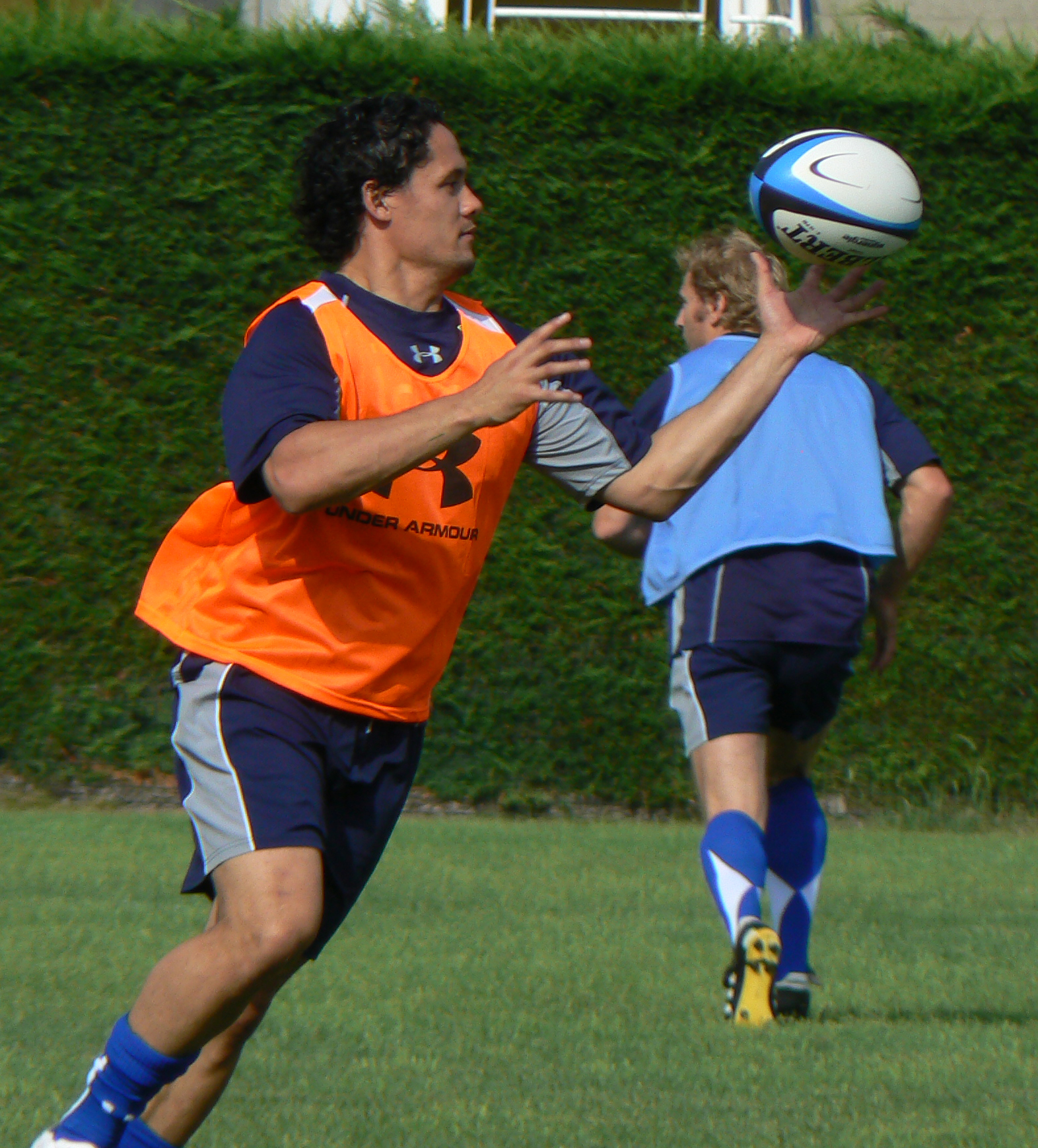 Le rugbyman néo-zélandais Tasesa Lavea lors d'un entrainement avec l'ASM Clermont Auvergne.